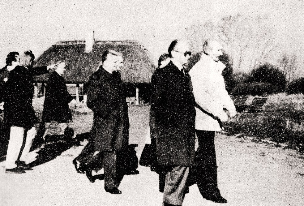 W. Jaruzelski z wizytą w Parku Etnograficznym w Dziekanowicach.